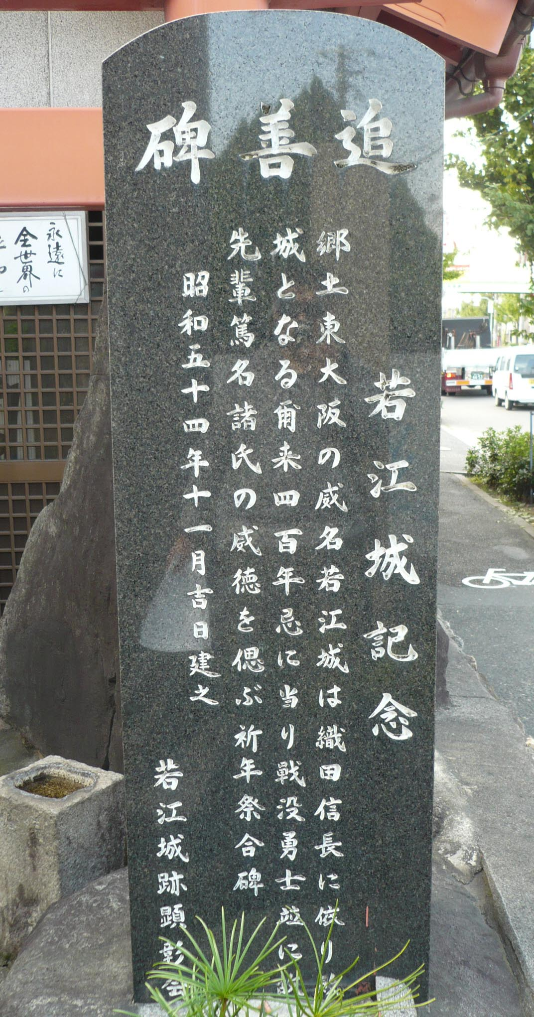 若江城記念の石碑